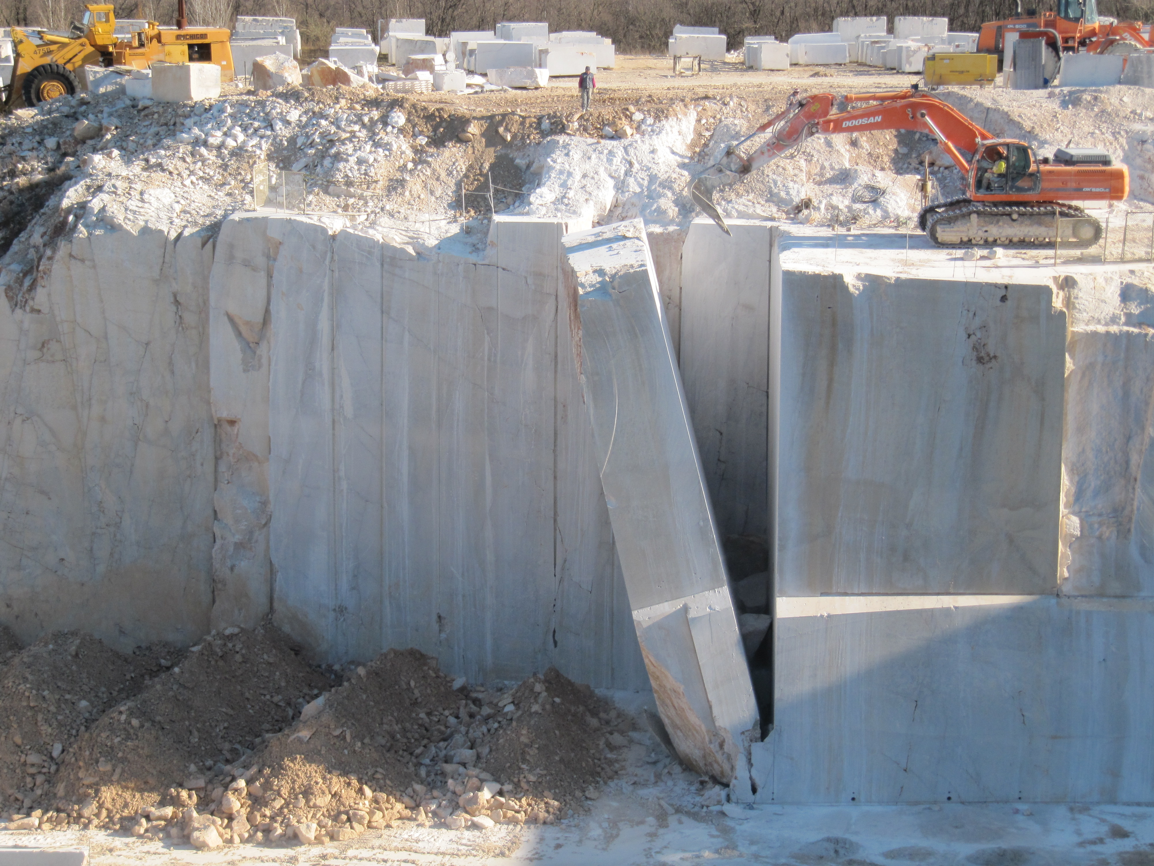 Ribaltamento di un banco di marmo Aurisina Fiorita nel bacino della Pizzul S.R.L. Marmi Aurisina.